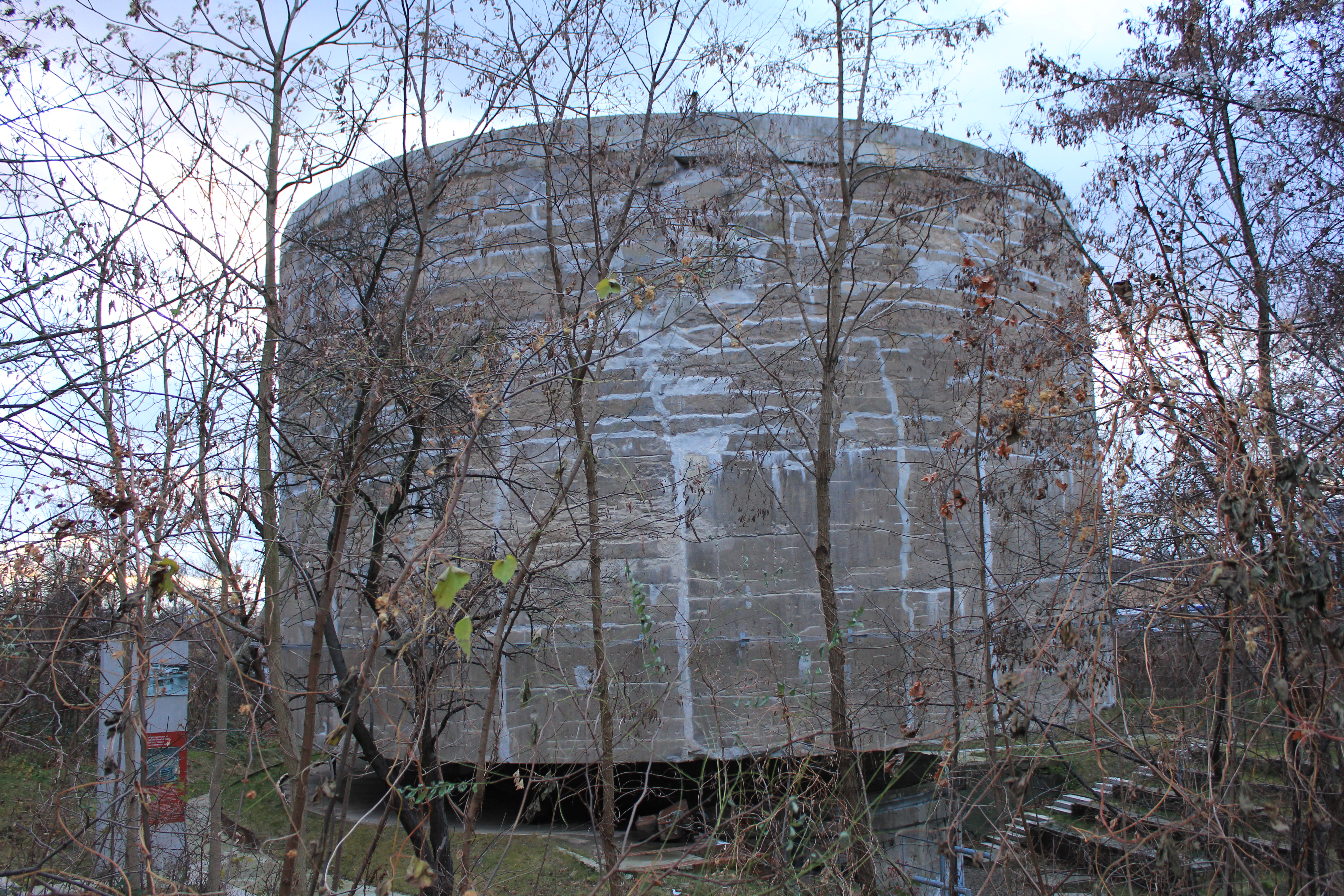 Großbelastungskörper 1941-42 von Dyckerhoff & Widmann